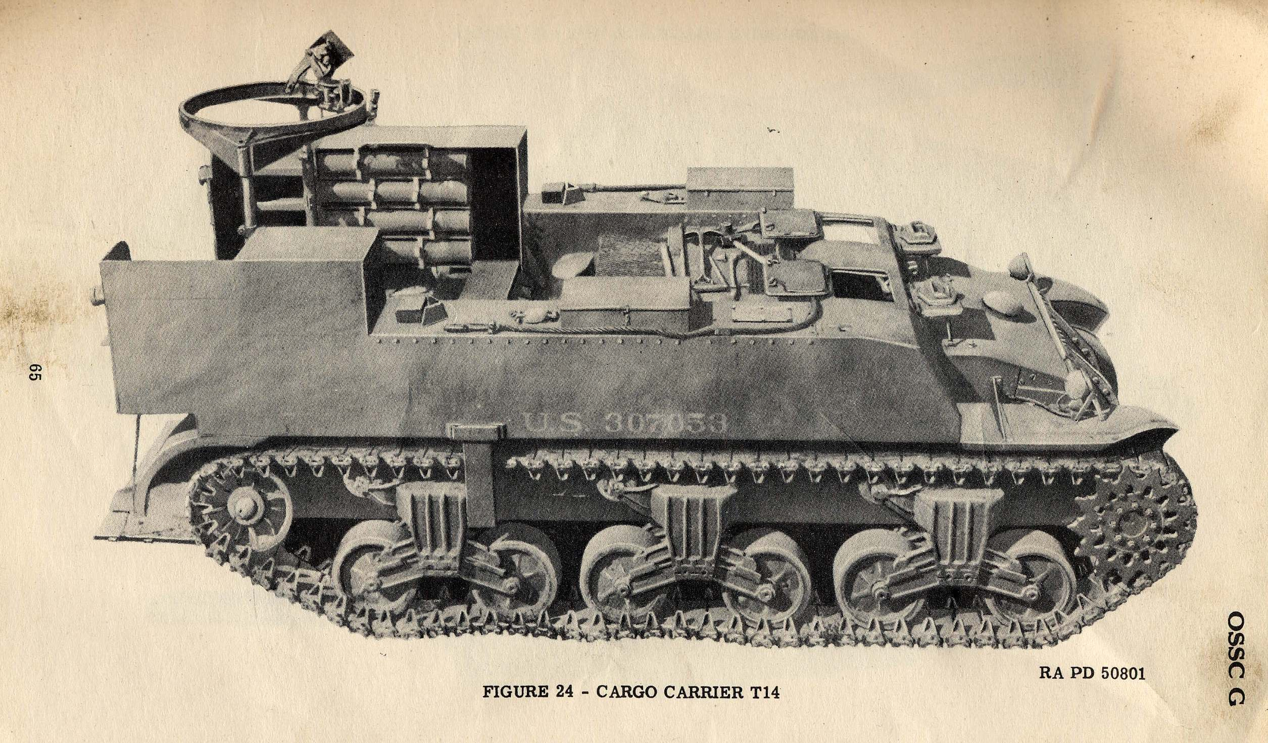 T-14/M30 Cargo Carrier